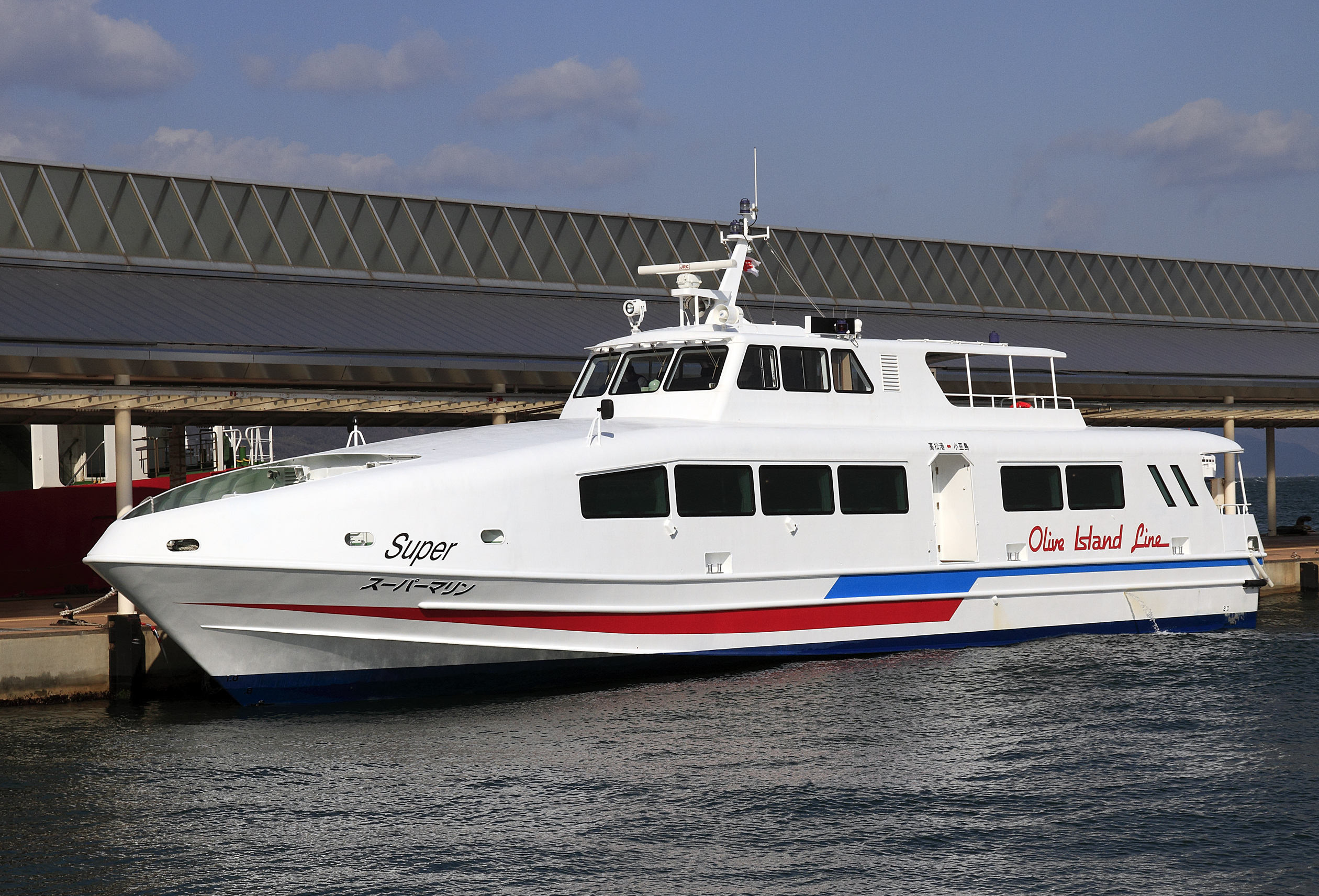 四国フェリー スーパーマリン （2011年就航）